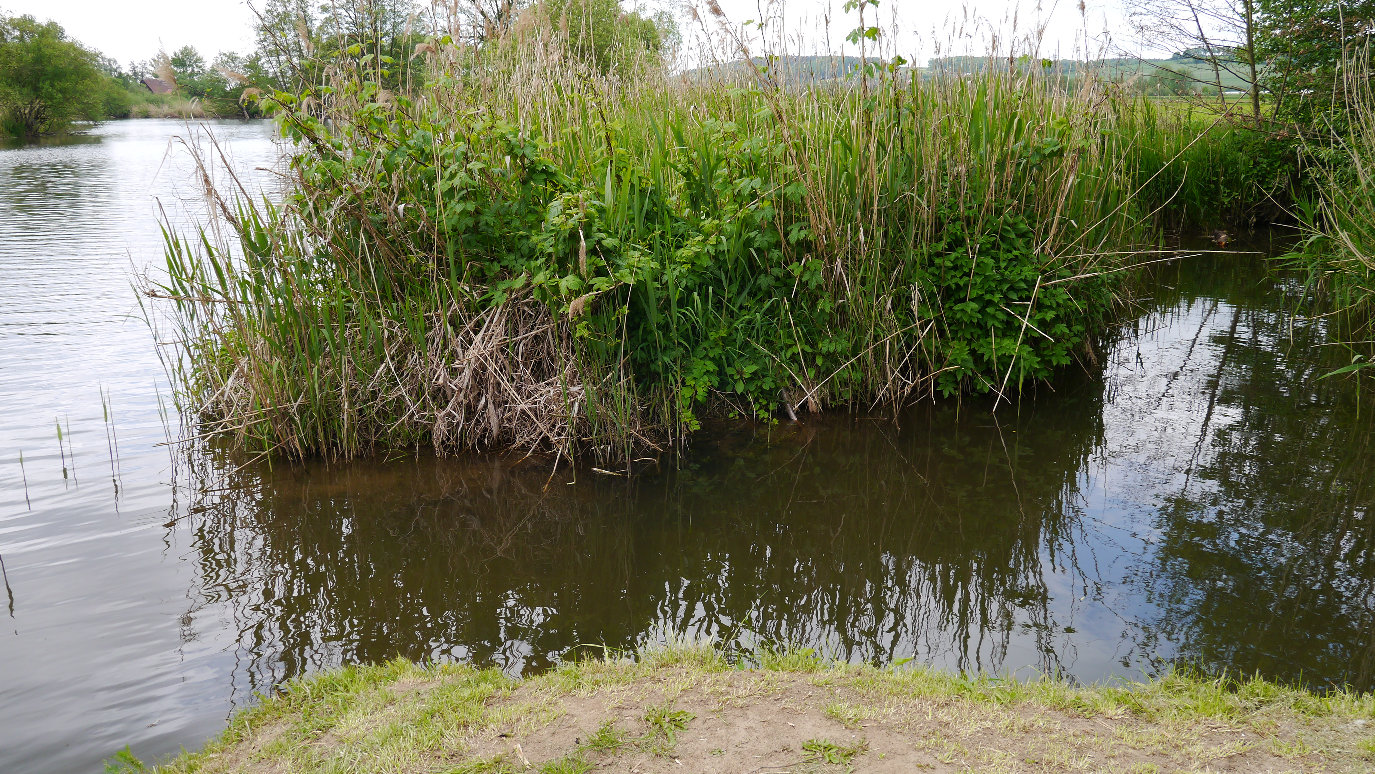 Bayern Oberfranken Main Zentbach